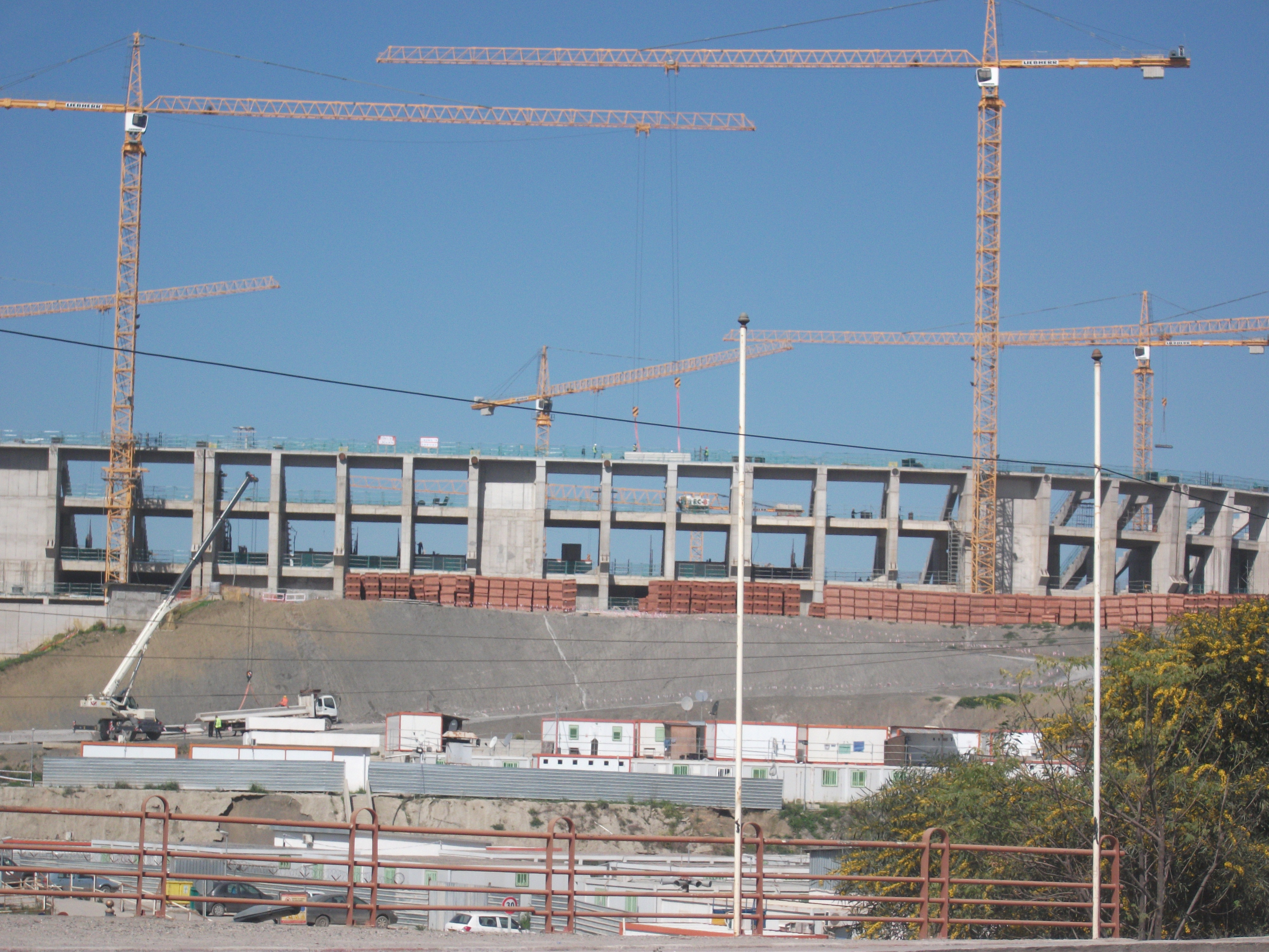 Nouveau stade de Tizi Ouzou en construction